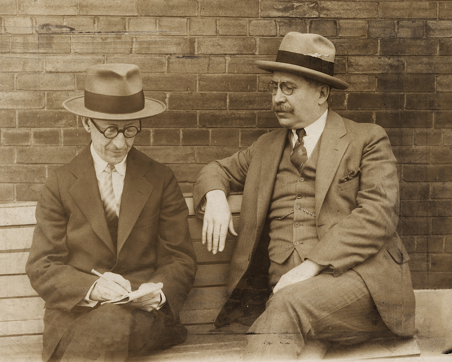 Jean Charbonneau, écrivain, traducteur et membre fondateur de l’École littéraire de Montréal, donnant une entrevue à son ami Paul de Martigny